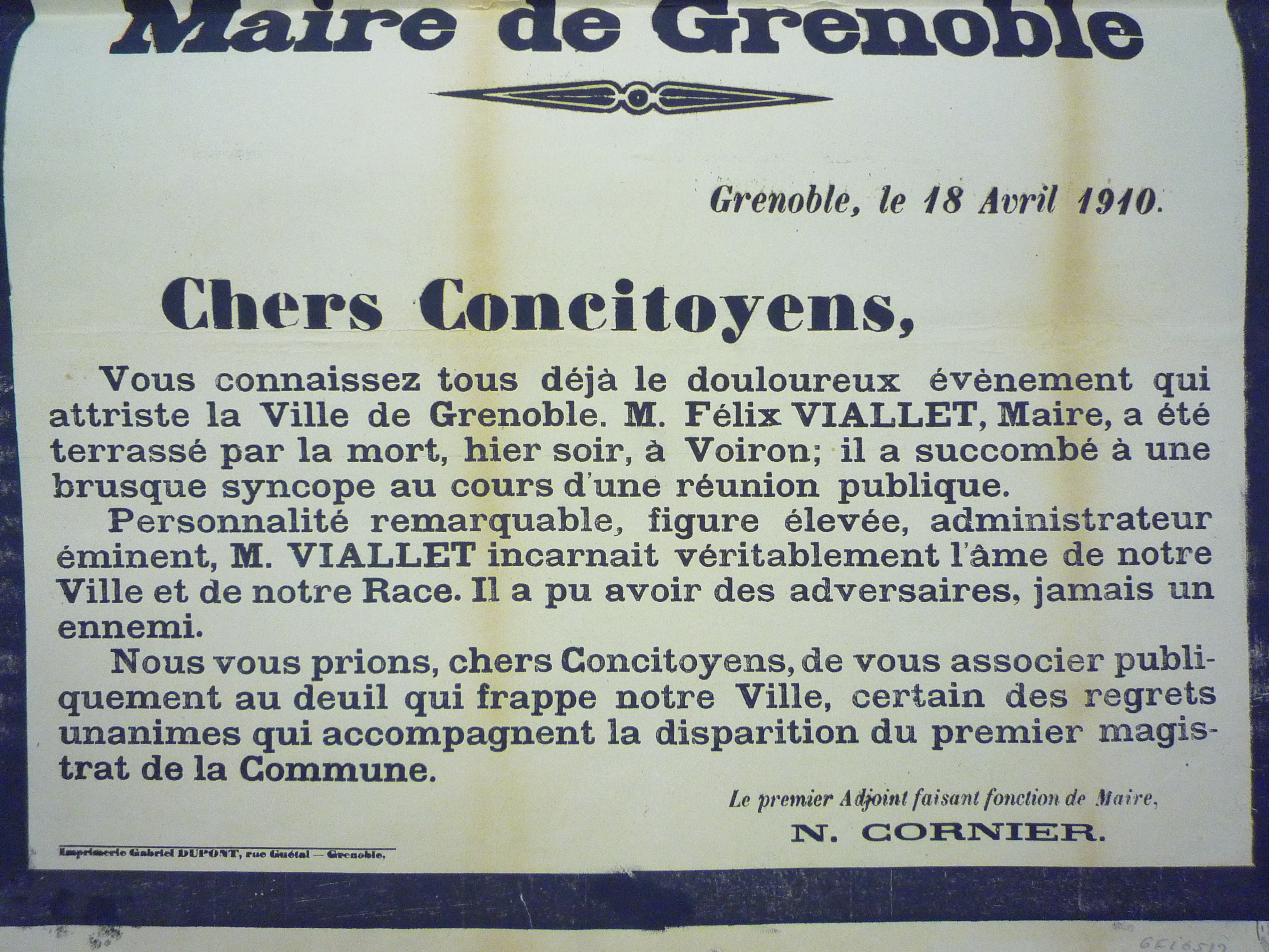 Avis de décès du maire Félix Viallet en 1910. Archives municipales de Grenoble, cote 6FI6441 à 6486